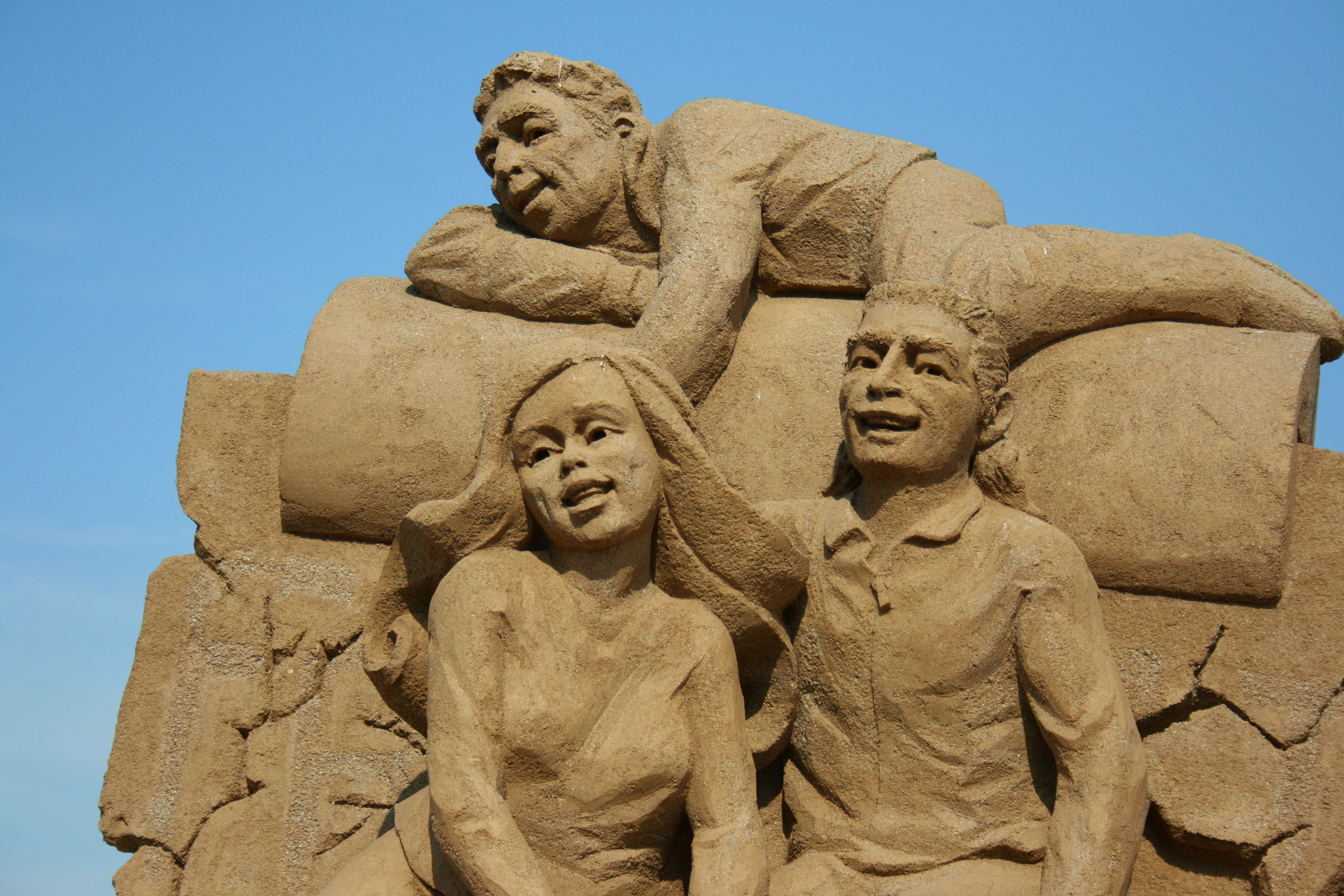 Sandskulpturen (ISY-Sandkunst) am Südsee in Xanten